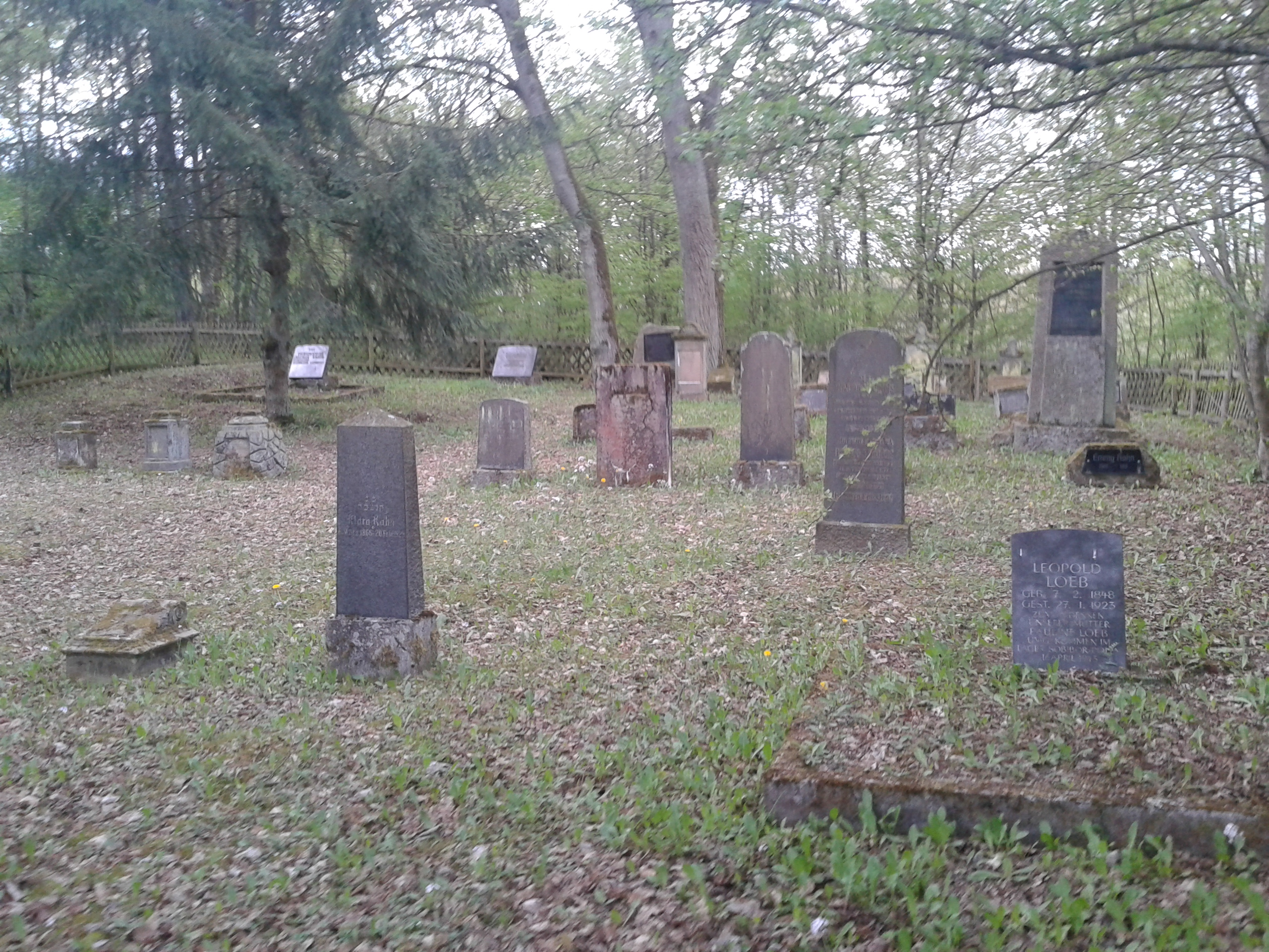 Kulturdenkmal Denkmalzone Jüdischer Friedhof Birkenfeld Nahe